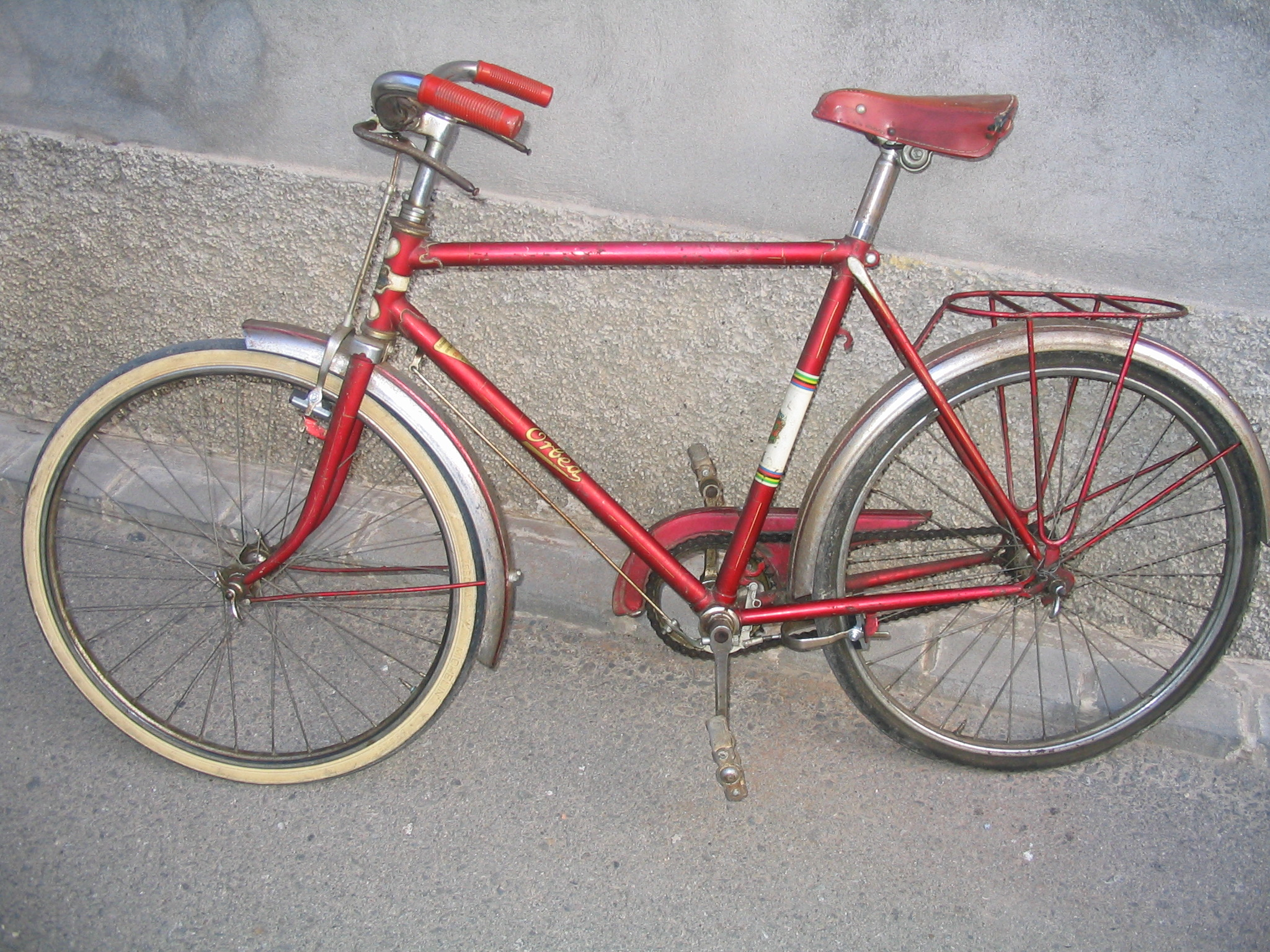 Bicicleta Orbea (de finales de la decada de 1960 o principios de la decada de 1970) adecuada para niño de unos 12 años